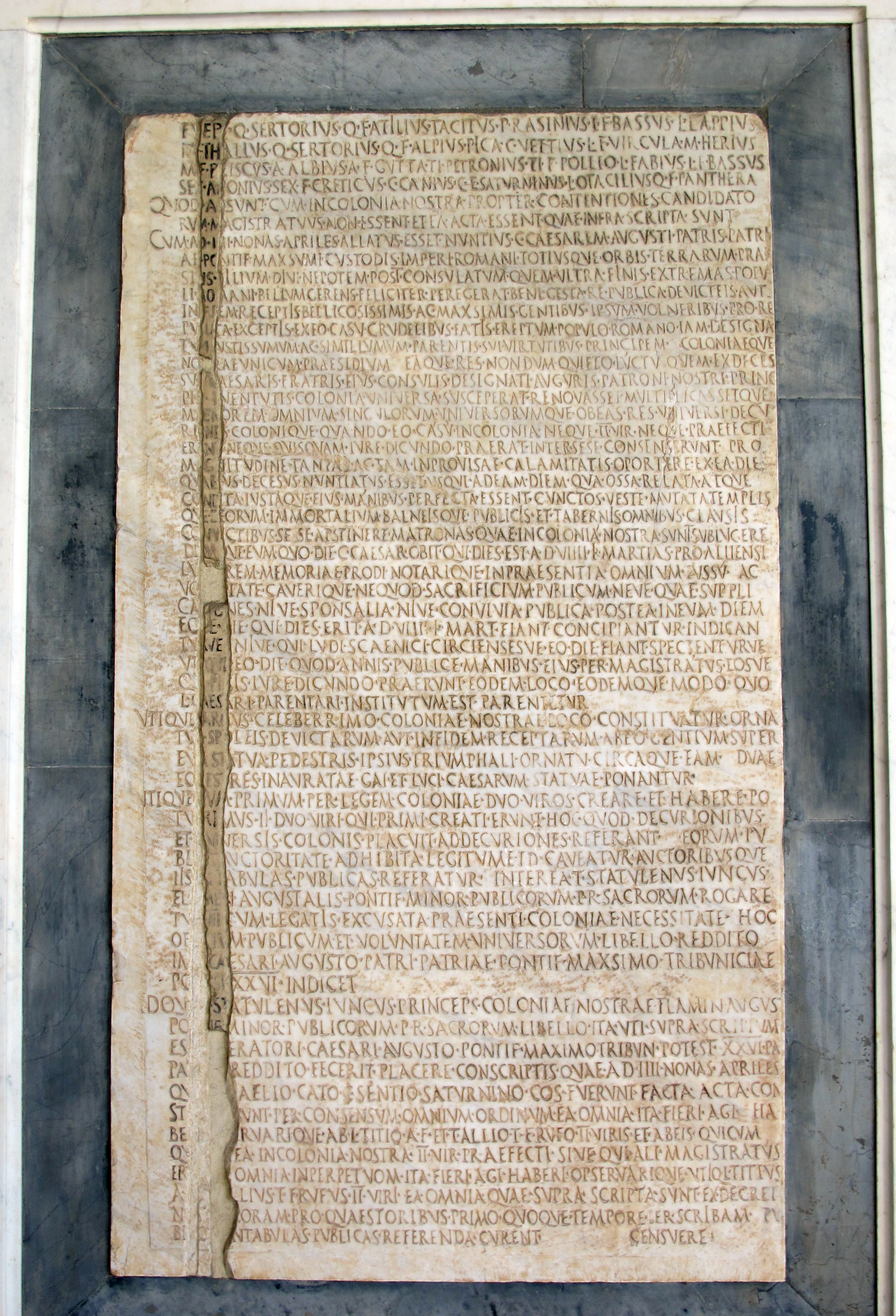 Camposanto, iscrizioni lato sud, 02 i decreti di Iulia Pisana per le onoranze funebri dei figli adottivi di Augusto Caio e Lucio Cesari, nel 2 e 4 d.C.